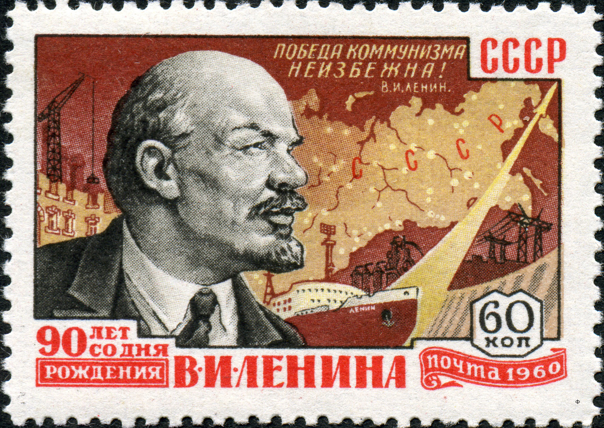 Марка СССР